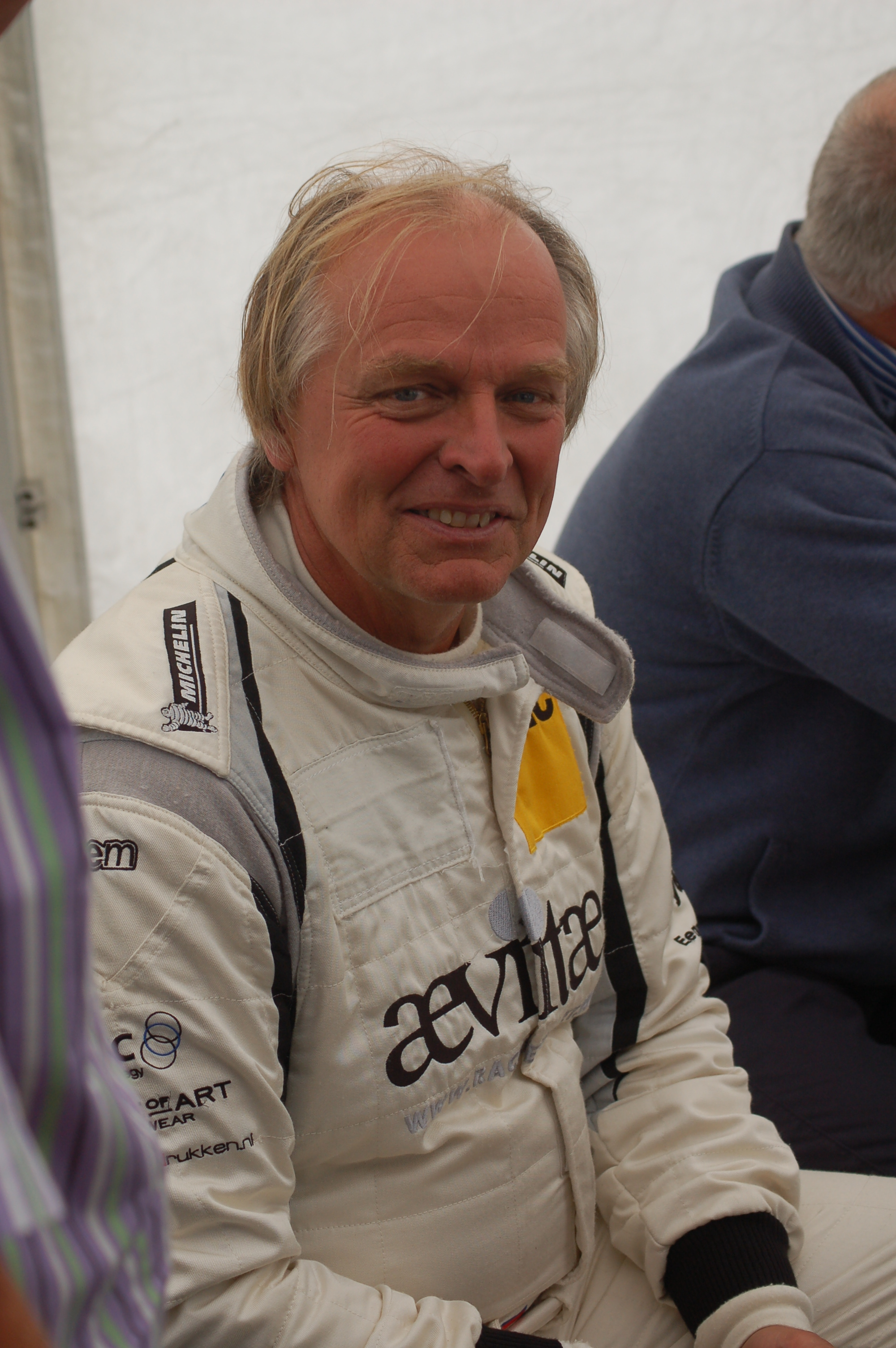 Michael Bleekemolen in Assen